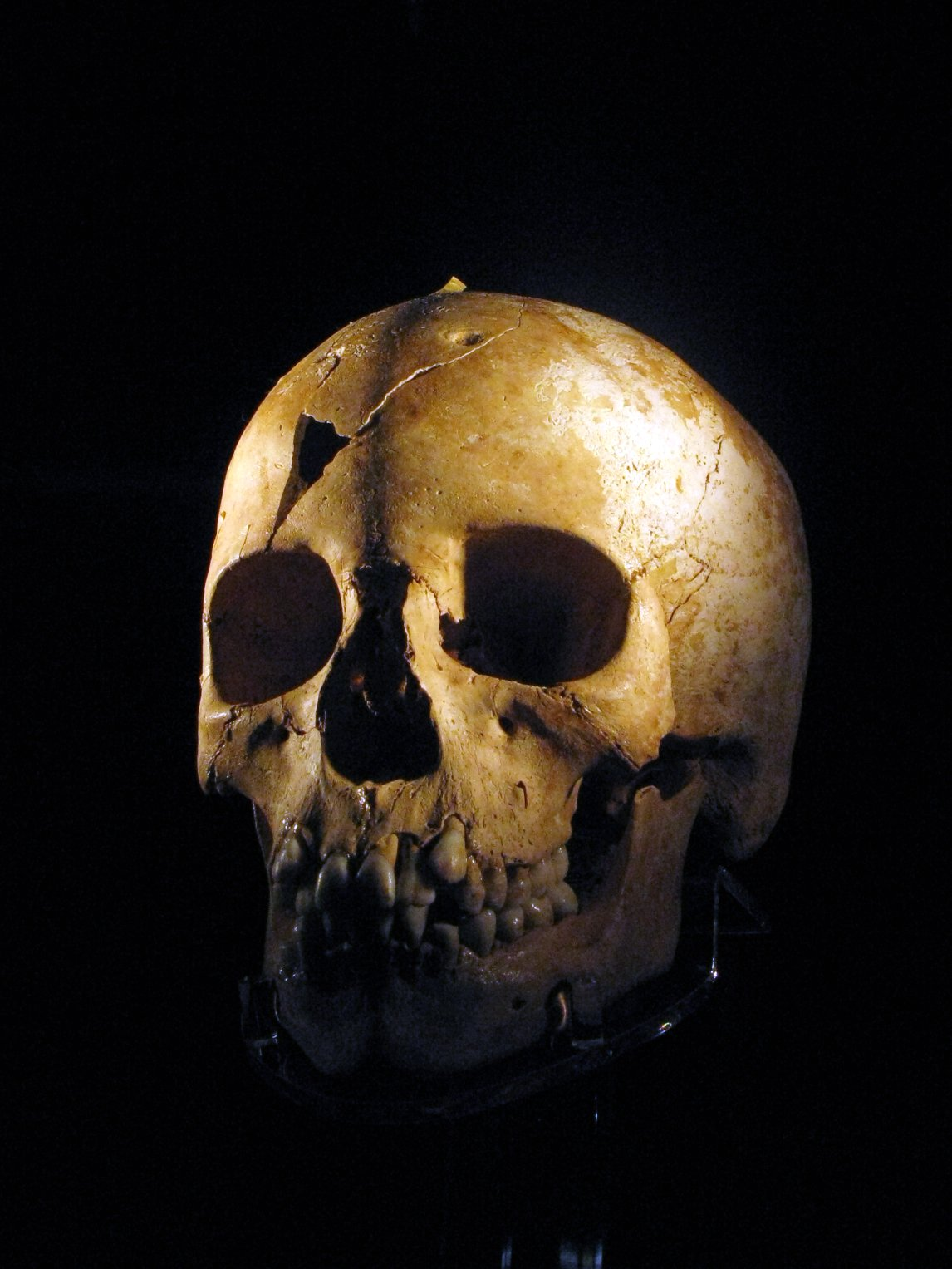 "Μyrtis: Face to face with the past" (A Temporary Exhibition at the National Archaeological Museum, Athens). "... [the exhibition] presents the results of an important interdisciplinary enterprise. The focal exhibit is the reconstructed face of an anonymous 11 year old Athenian girl who was –along with Perikles- one of the tens of thousands victims of typhoid fever in the year 430 BC, the second year of the Peloponnesian war between Athens and Sparta and their allies..." For --- Μύρτις... 24 αιώνες μετά η Μύρτις αντικρίζει τους πολίτες του 21ου αιώνα. "Μύρτις. Πρόσωπο με πρόσωπο με το παρελθόν (περιοδική έκθεση στο Εθνικό Αρχαιολογικό Μουσείο). "...Πρόκειται για την παρουσίαση ενός σημαντικού διεπιστημονικού επιτεύγματος. Κεντρικό έκθεμα είναι το αναπλασμένο πρόσωπο της ανώνυμης 11χρονης Αθηναίας, που υπήρξε και αυτή, όπως και ο μέγας Περικλής, ένα από τα δεκάδες χιλιάδες θύματα του τυφοειδούς πυρετού του 430 π.Χ...." Για περισσότερες πληροφορίες